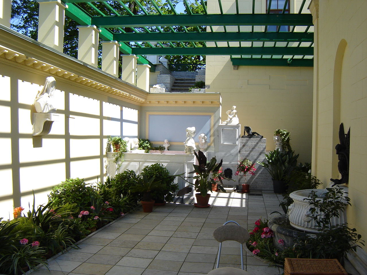 Внутренний садик Царицына павильона